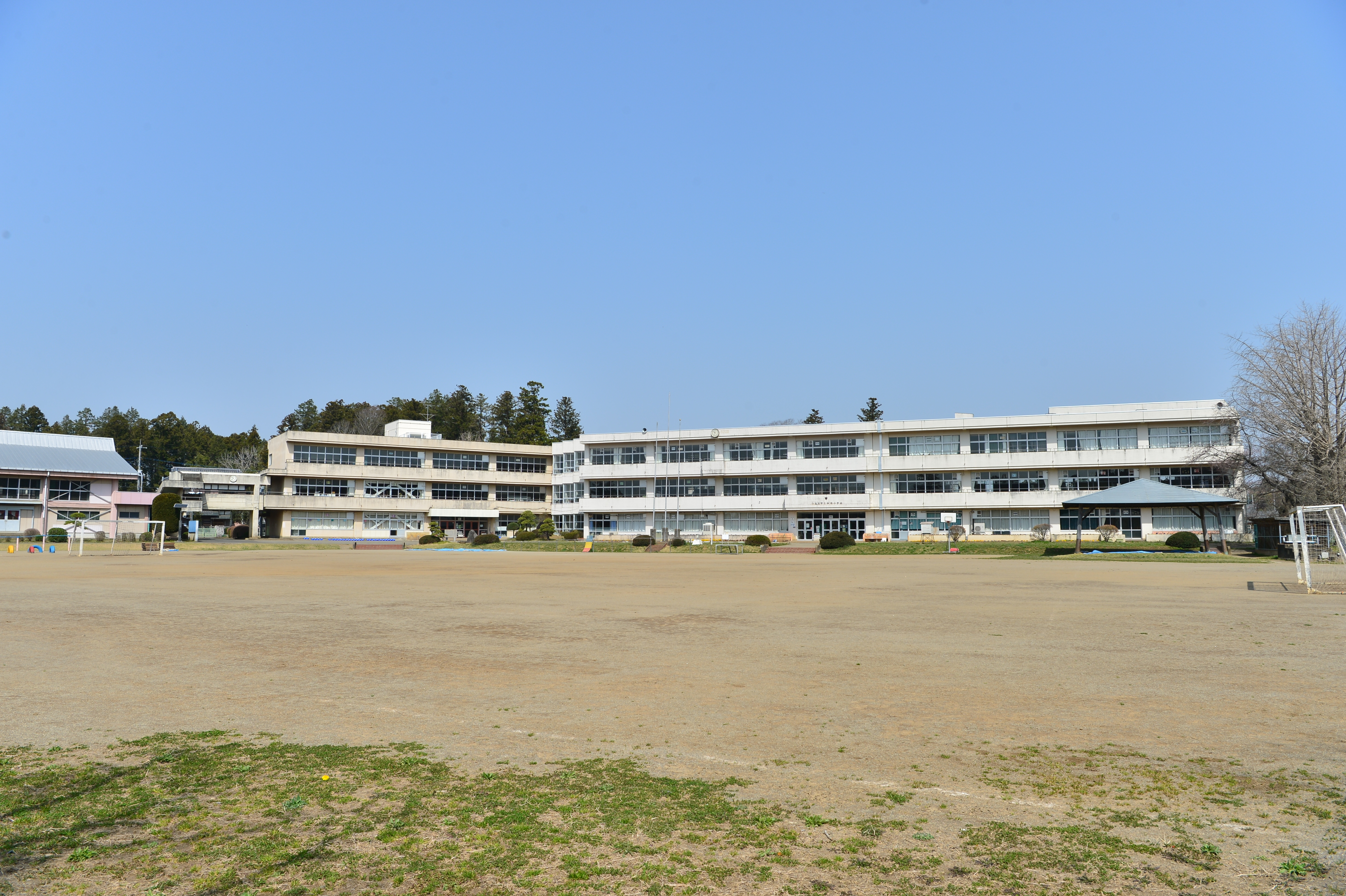 茨城県小美玉市納場の小美玉市立納場小学校。校庭から見た校舎。